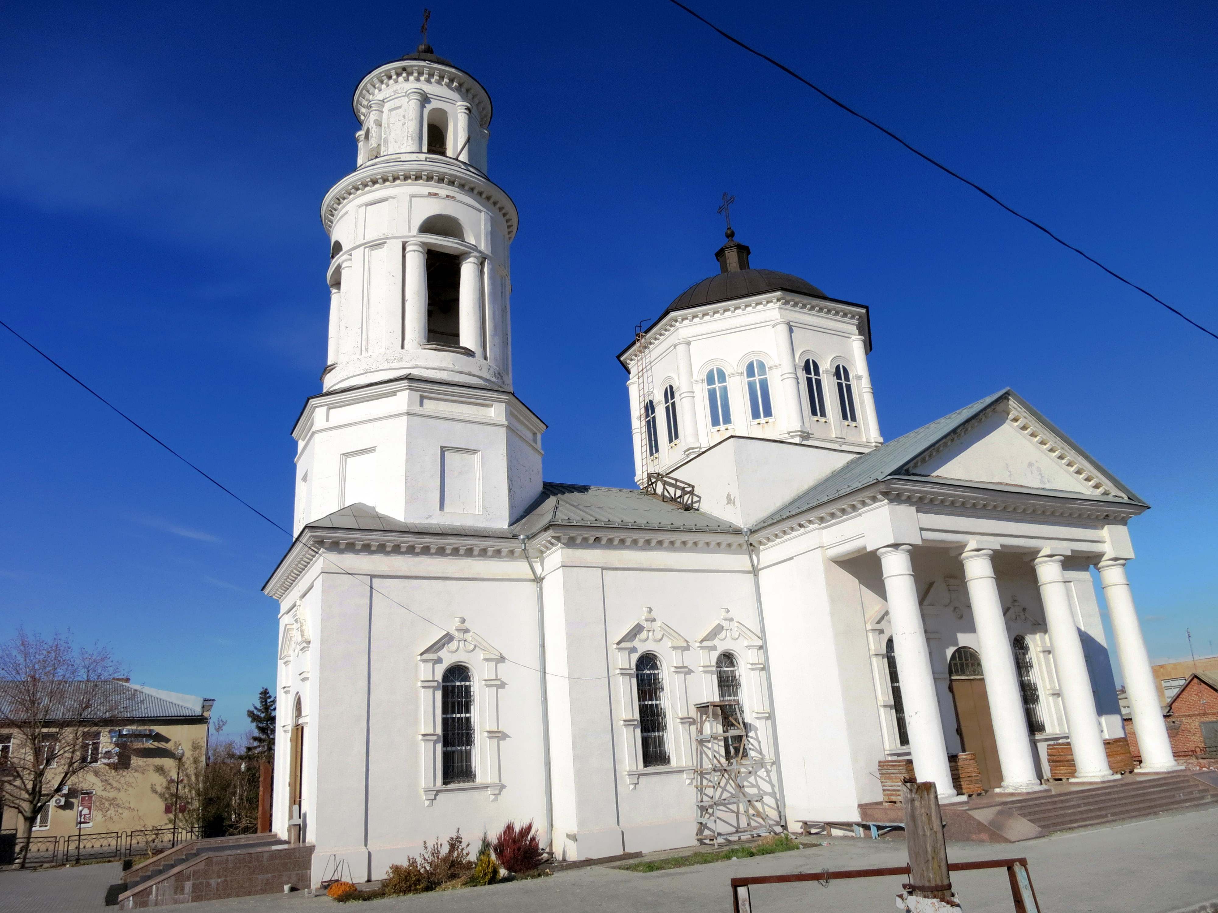 Церковь Сурб-Амбарцум: центр, Чалтырь, Мясниковский район, Ростовская область